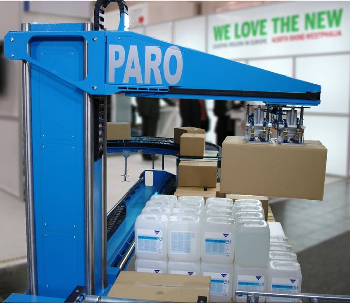 Lineararmroboter PARO (veröffentlichtes Messefoto)